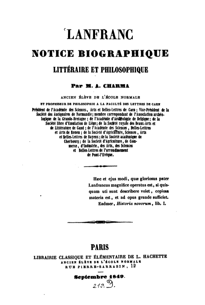 Page de titre de “Lanfranc, notice biographique, littéraire et philosophique” d'Antoine Charma, 1849.